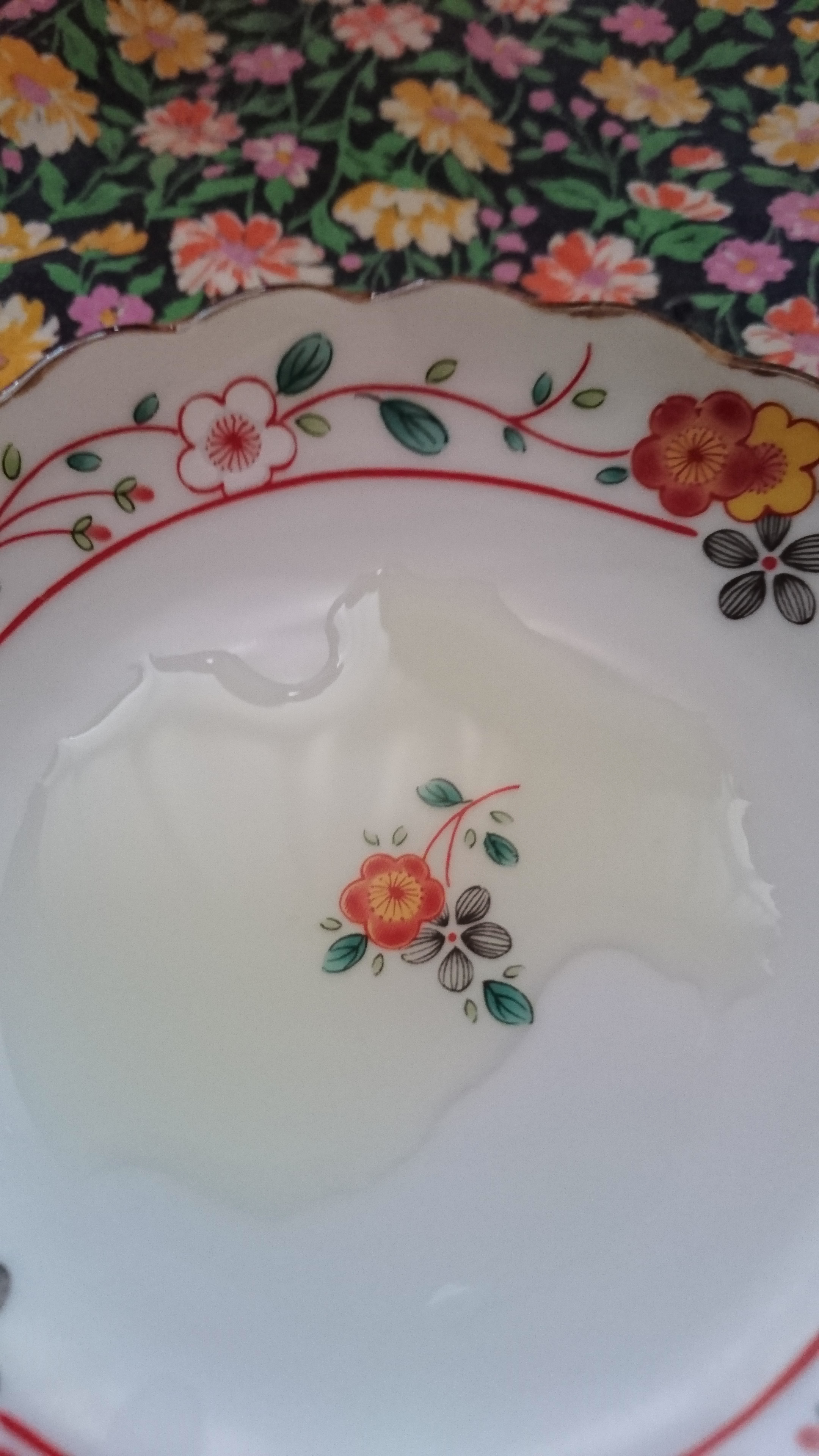 味ぽんとぽん酢の違い。